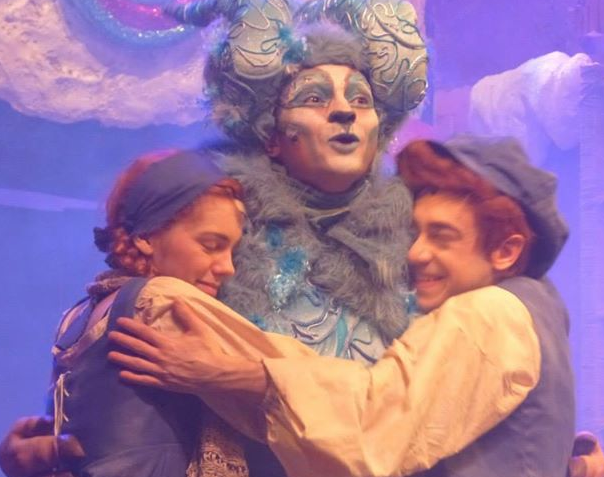 Anaïs Delva, Alexandre Faitrouni et Guillaume Beaujolais dans Hansel et Gretel au Palais des Glaces de Paris en 2014